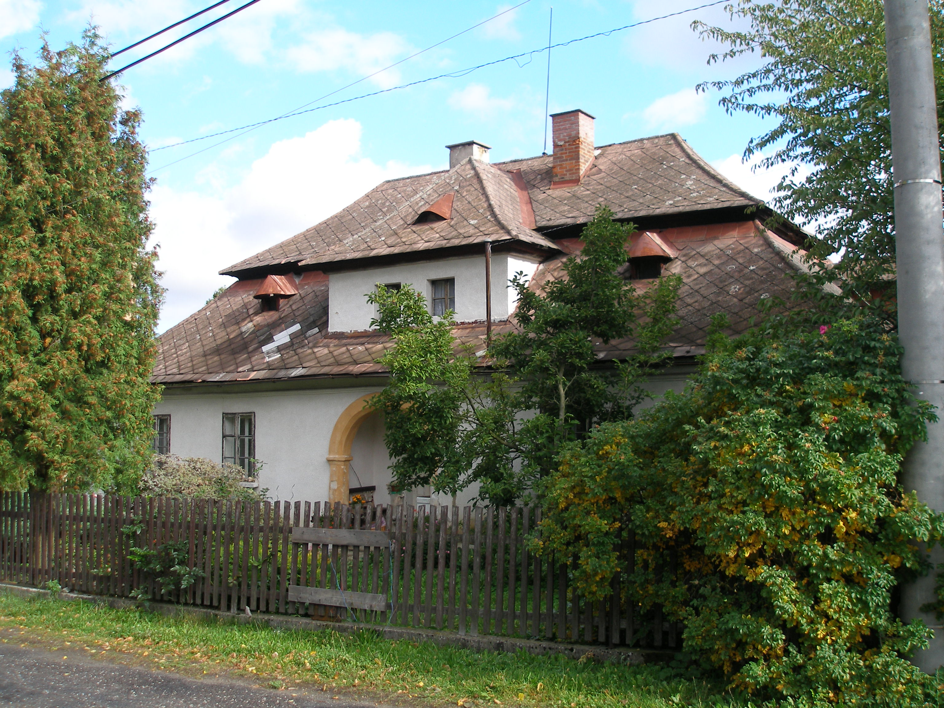 Sudějov - fara